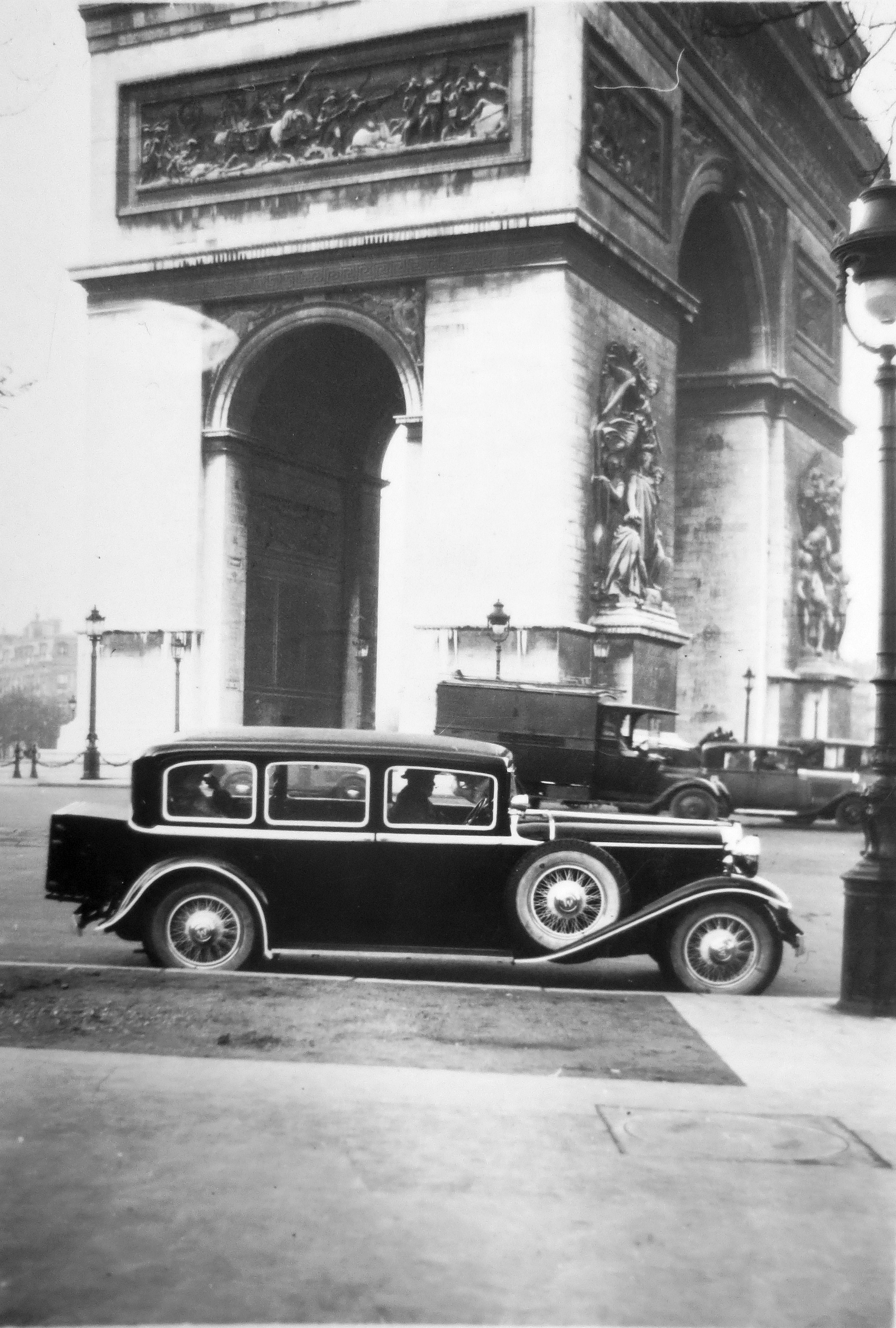 Walter Royal (1931) limuzína v Paříži před Vítězným obloukem